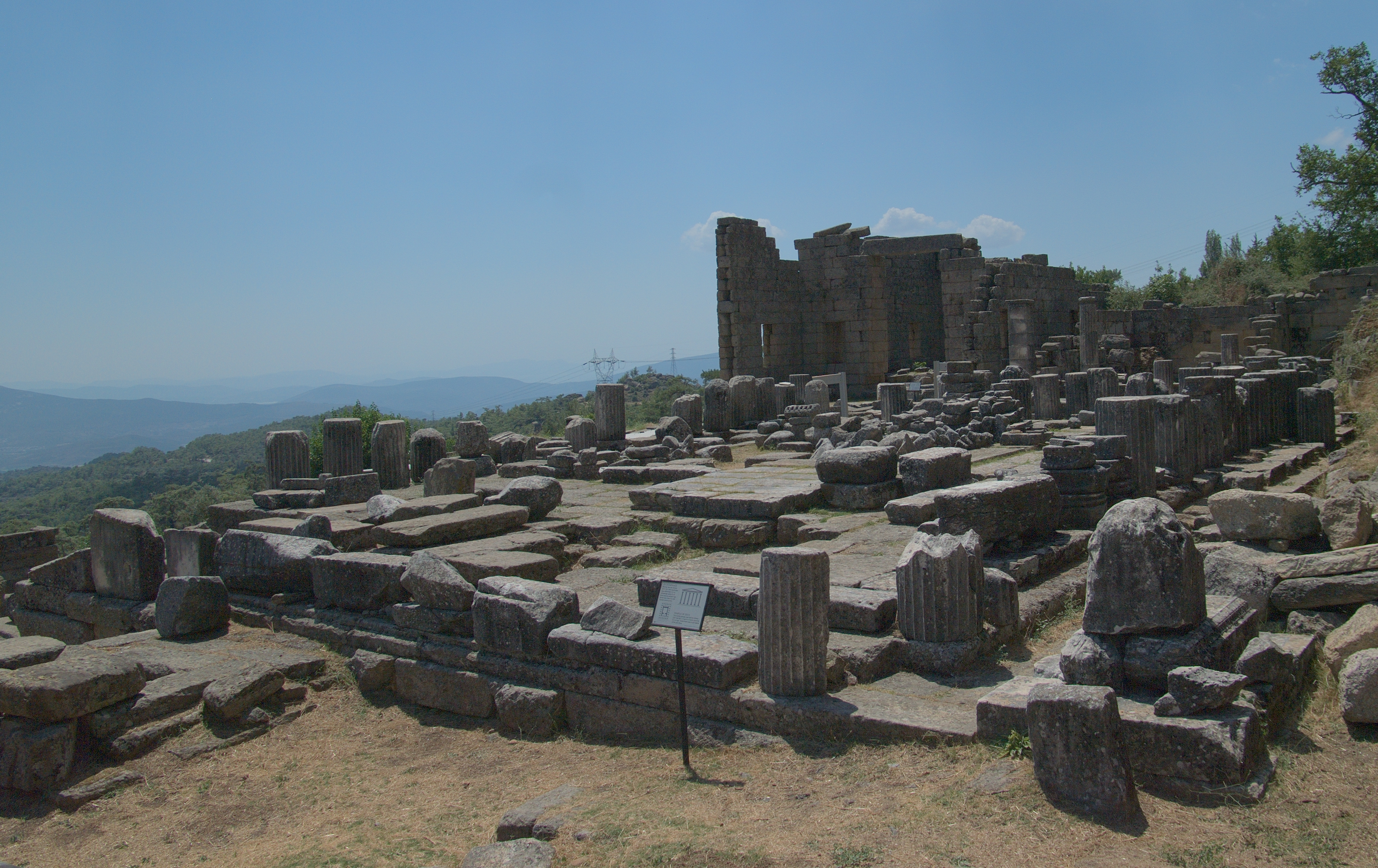 Лабранда. Храм Зевса